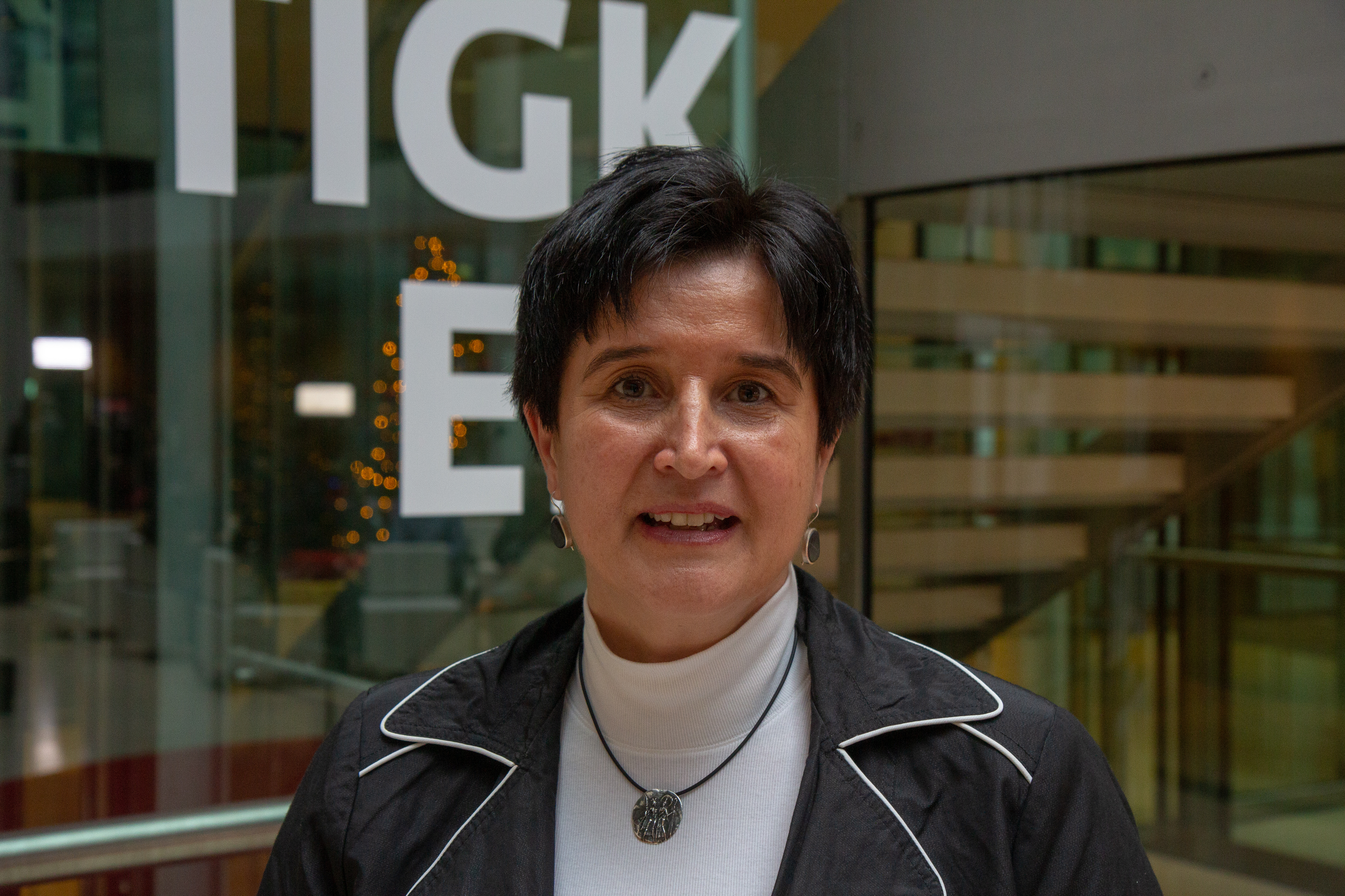 Maria Noichl auf der Europadelegiertenkonferenz der SPD am 9. Dezember 2018 in Berlin, Willy-Brandt-Haus